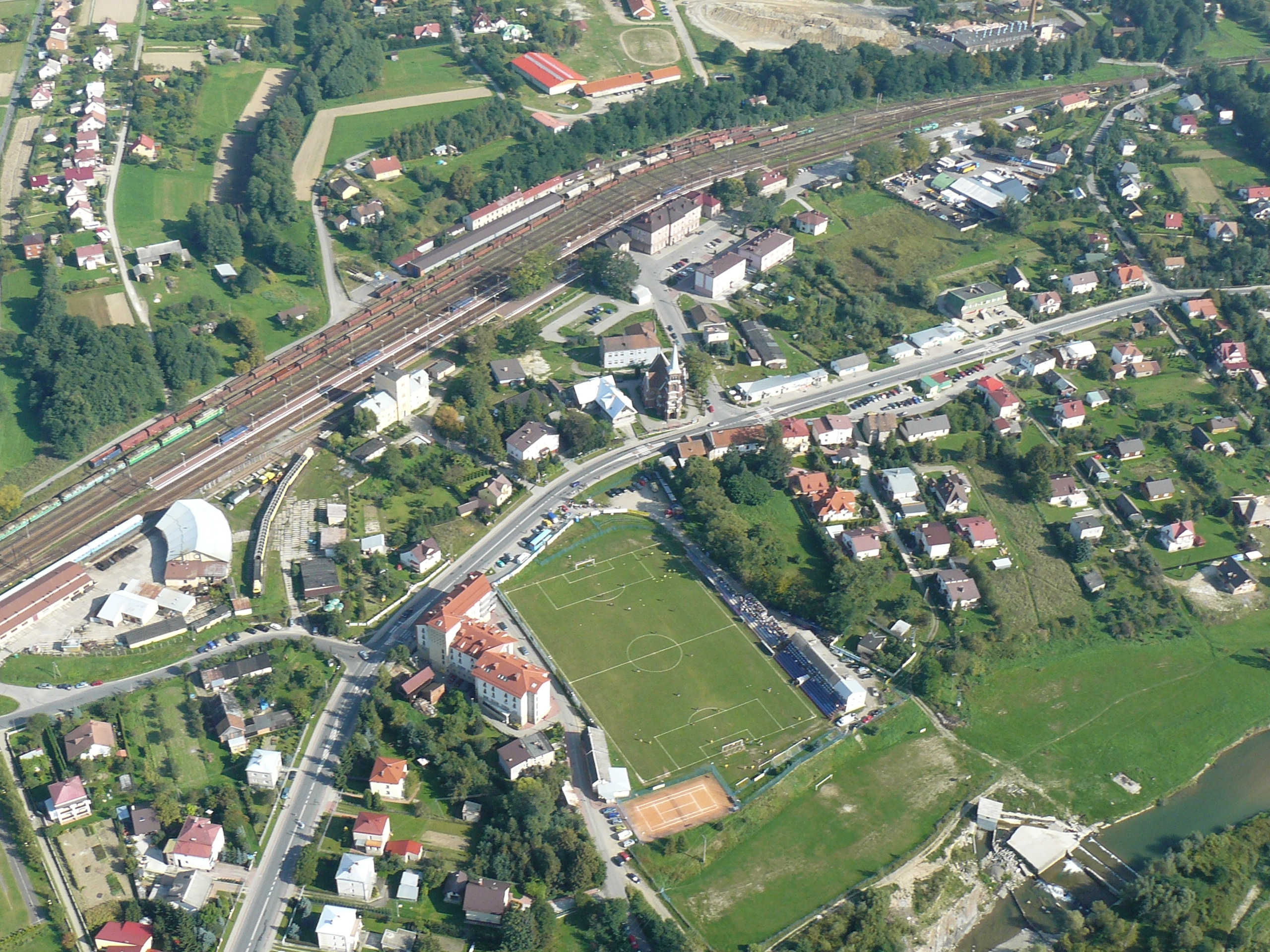 Stróże z lotu ptaka ,2009r